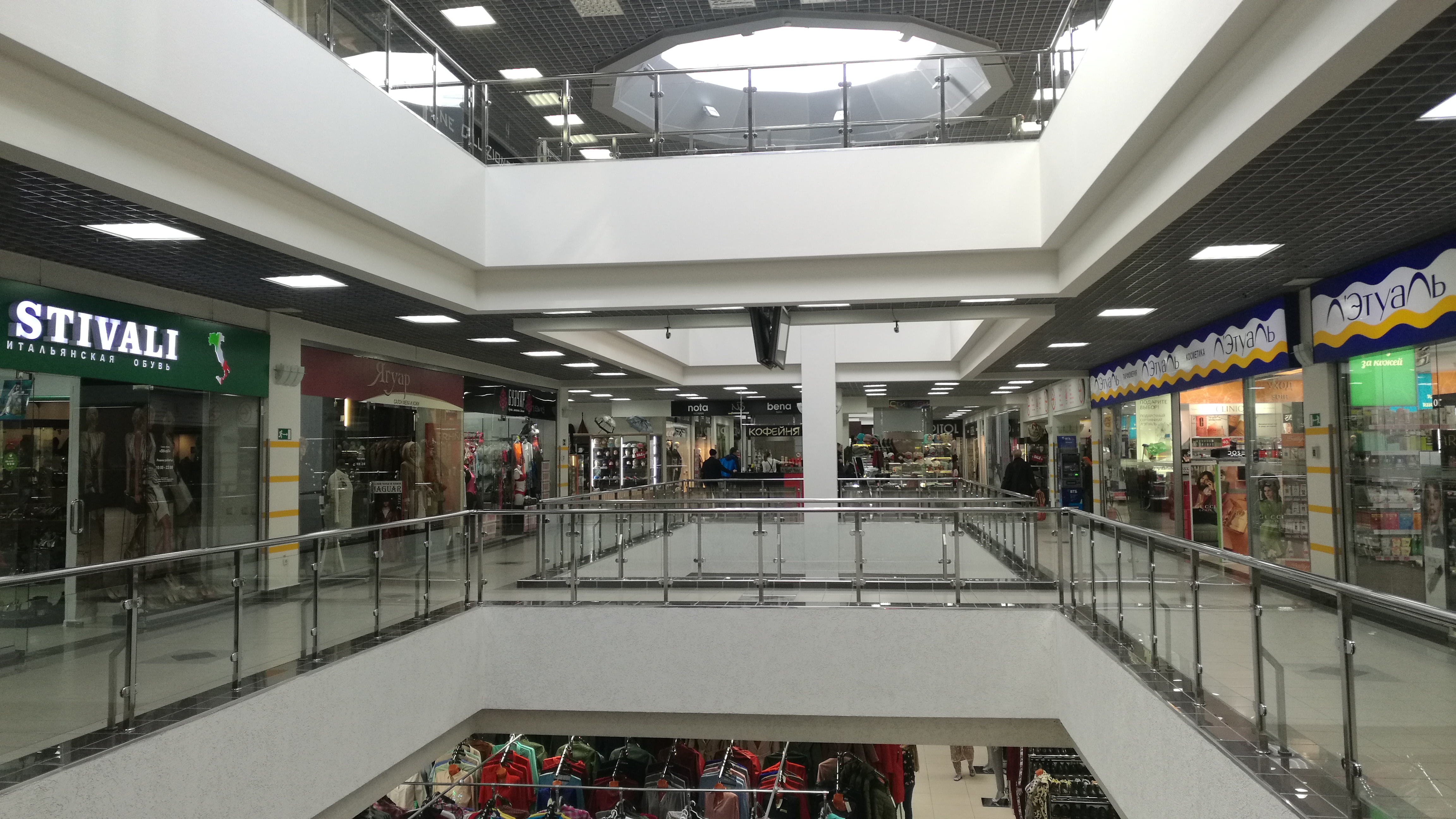 La aĉetcentro "Premier". Tjumeno, Rusio.